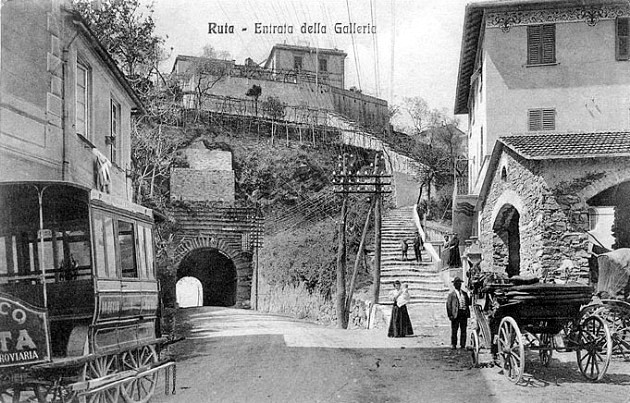 Immagine di fine Ottocento e inizio Novecento della galleria sull'Aurelia presso Ruta di Camogli, Camogli, Liguria, Italia